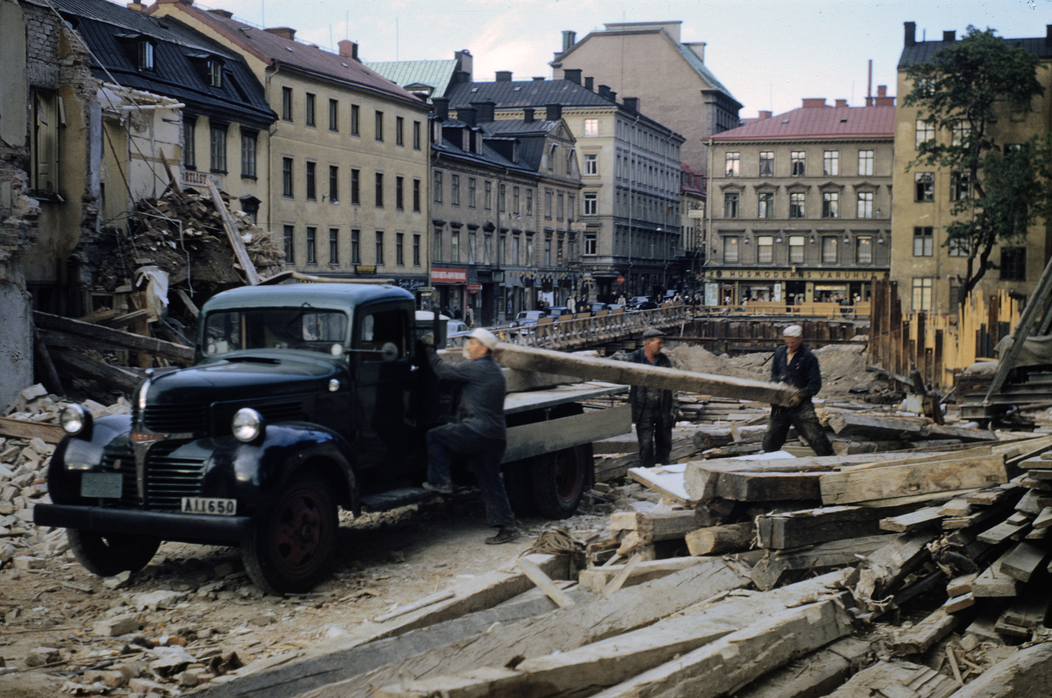 Klarabergsgatan österut, Drottninggatan i fonden med Husmoderns varuhus (Drottninggatan 46). Tunnelbanebygge.